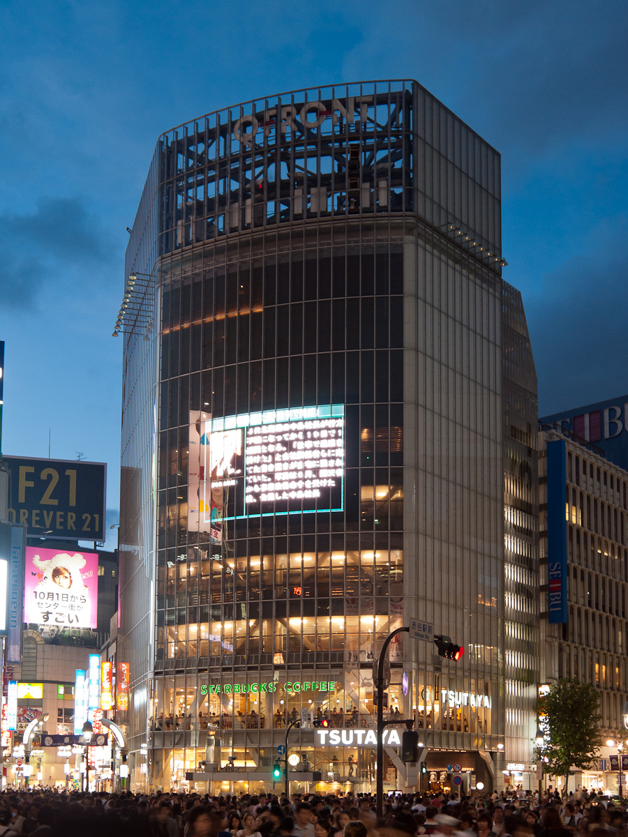 渋谷QFRONT、節電営業中。東京都渋谷区宇田川町。